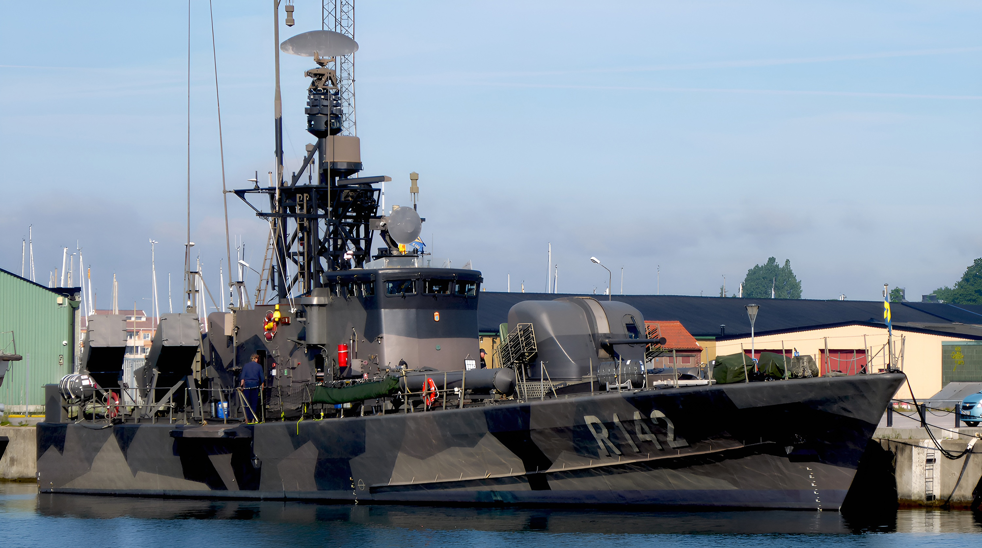 Robotbåten Ystad R142 på flottbesök i Ystad 15 juni 2017.